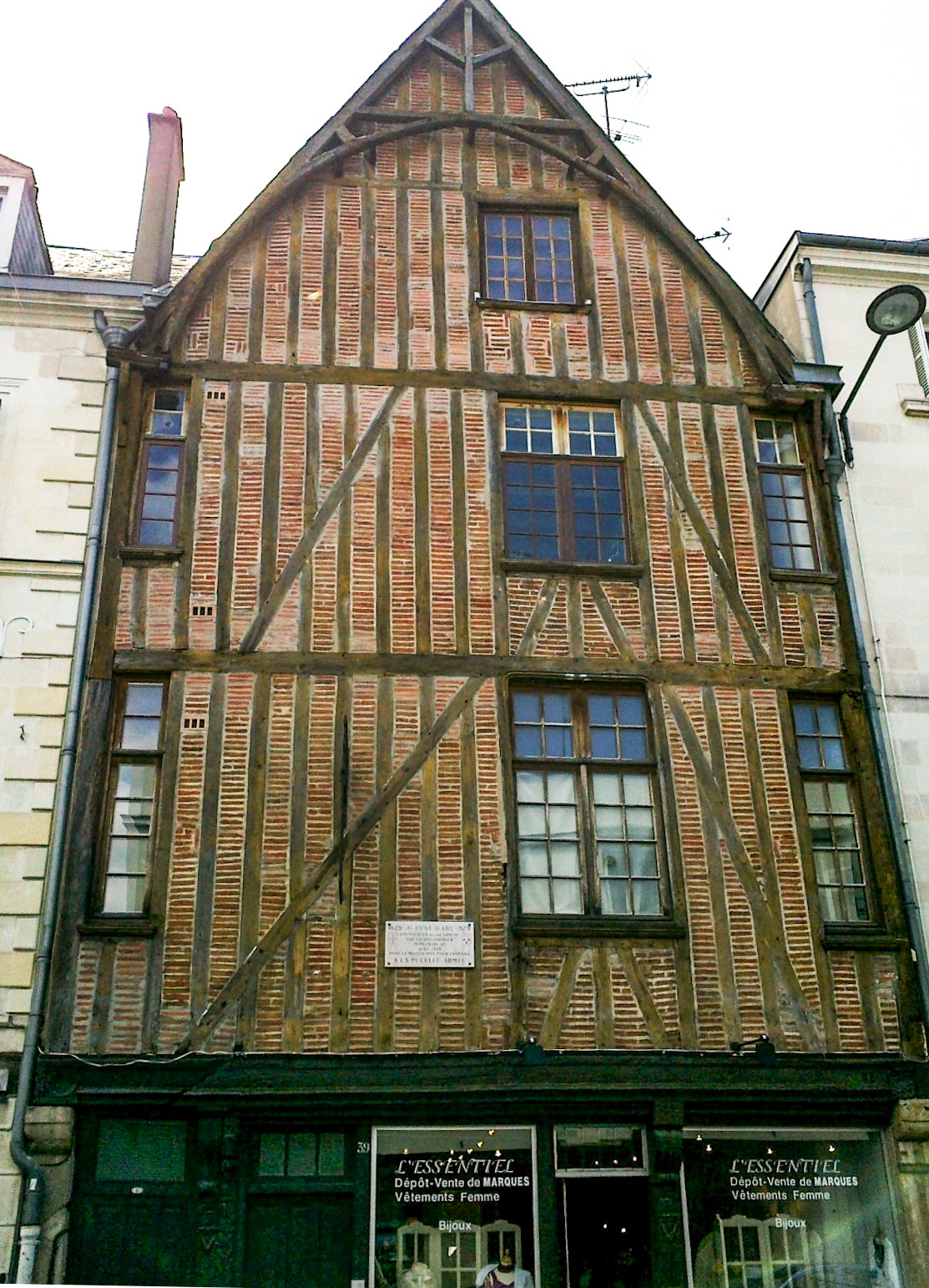 Indre-Et-Loire Tours Rue Colbert Maison De La Pucelle 18052012